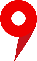 Логотип Яндекс.Карт